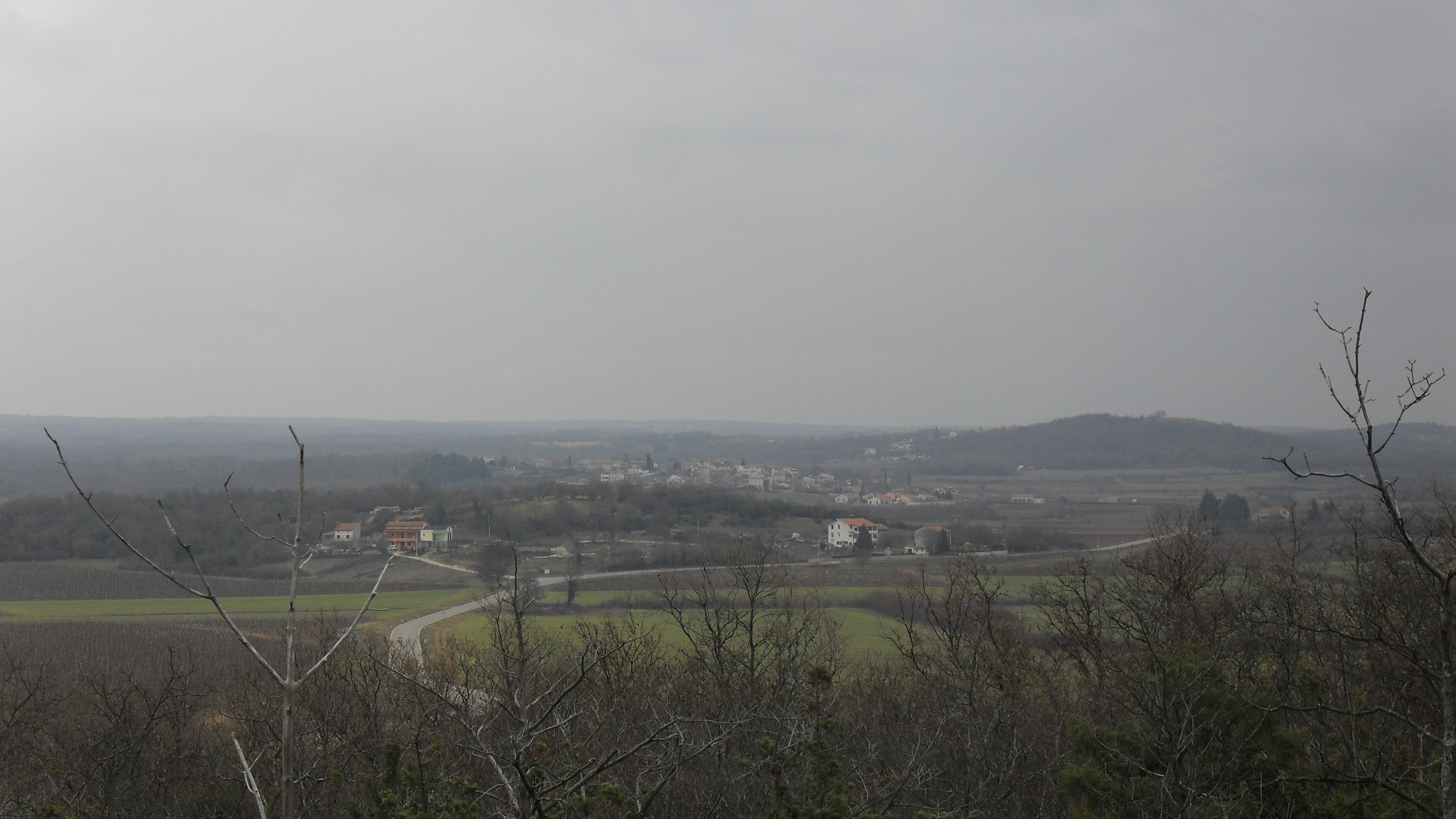 Starici i Dracevac,panorama